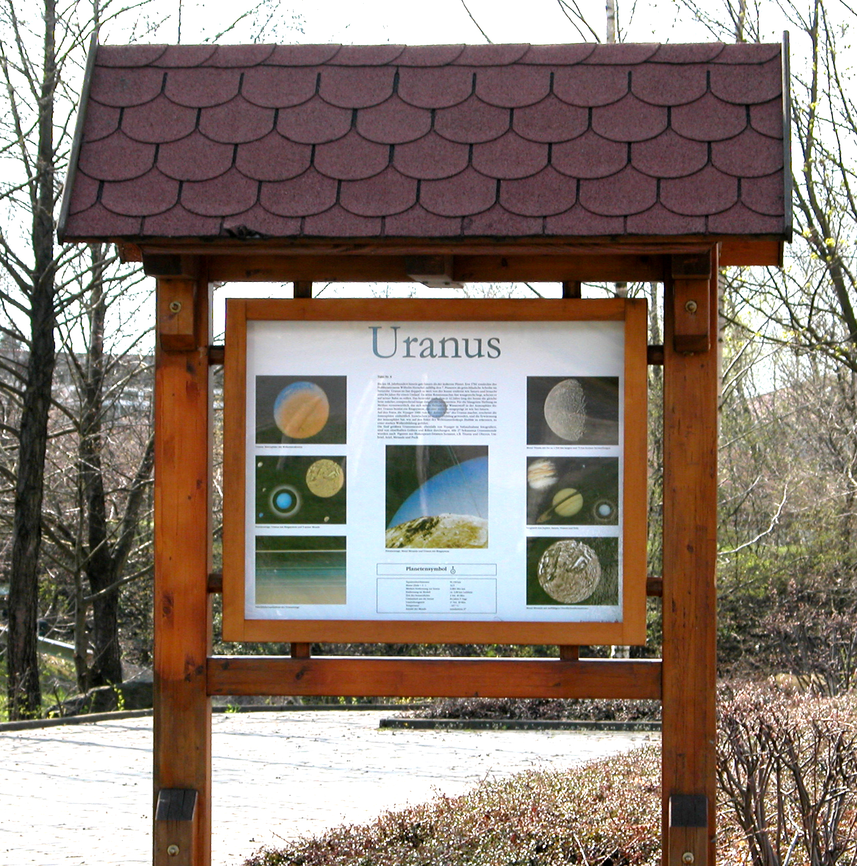 Uranustafel.jpg